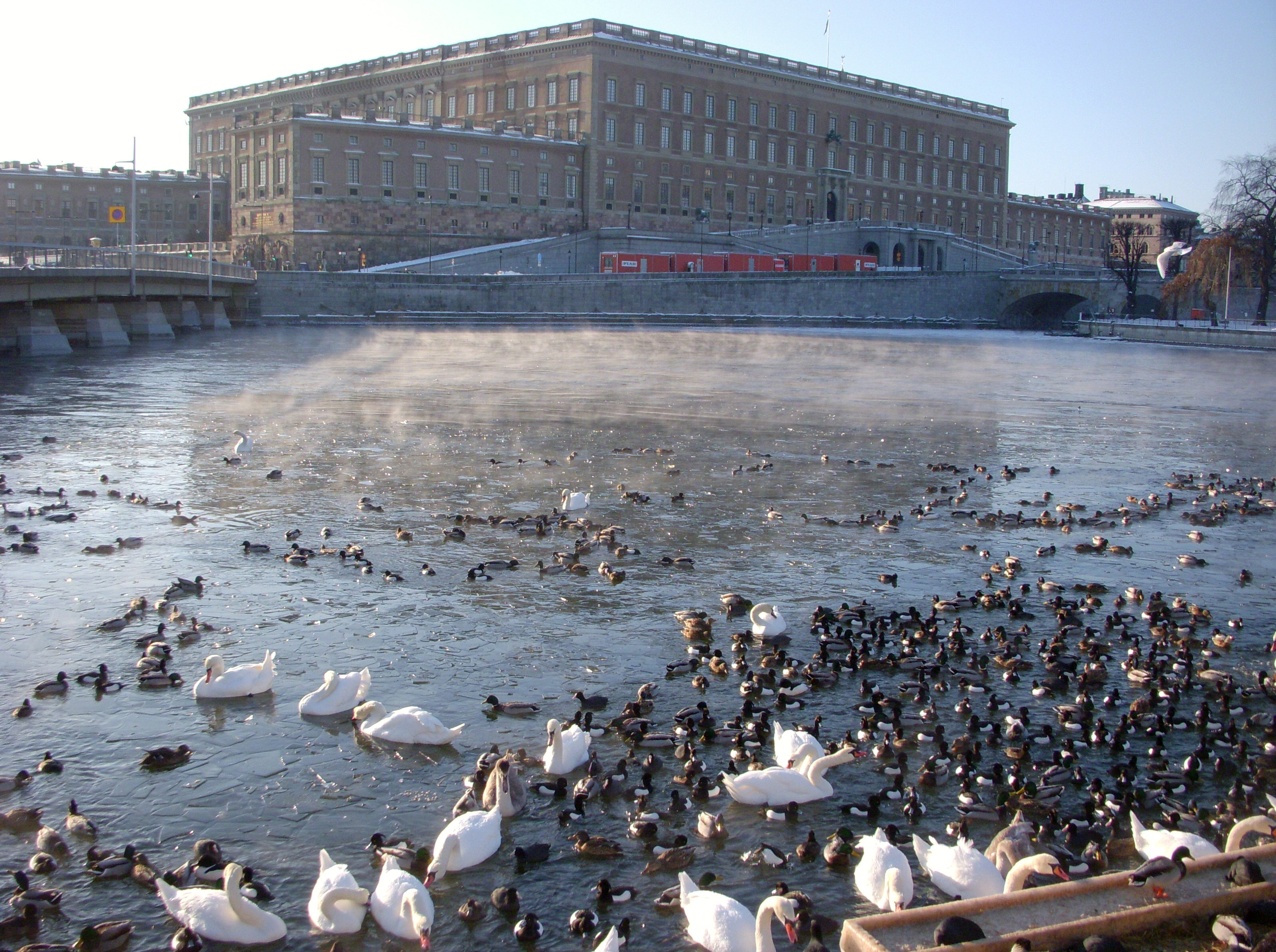 Norrström på vintern med Stockholms slott i bakgrunden